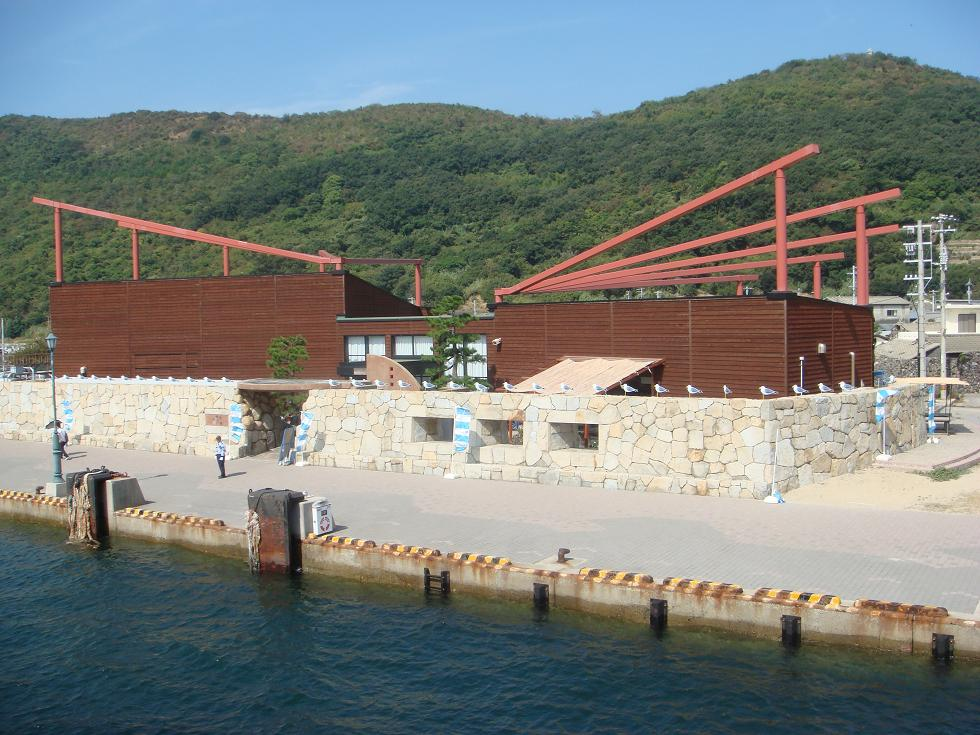 香川県高松市女木島の港にある「おにの館」。フェリーめおん船上から撮影。